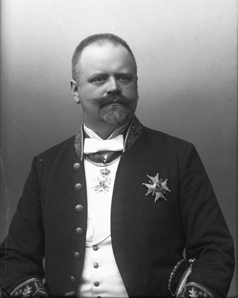 Vilhelm Andreas Wexelsen (1849–1909), biskop og statsråd.